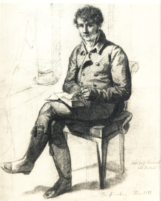 Porträt des Malers und Radierers Adolph von Heydeck